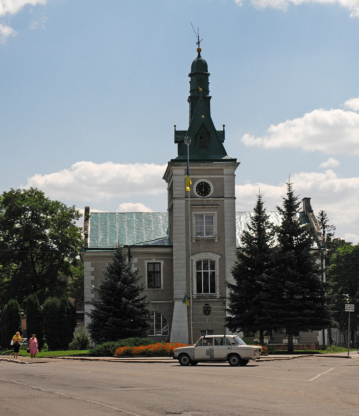 Ратуша в в Кам'янці-Бузькій